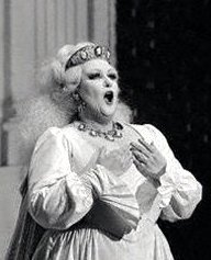 Montserrat Caballé, (born in Barcelona, 1933) at Aix en Provence Festival in 1980 : Sémiramide from Rossini.152573365